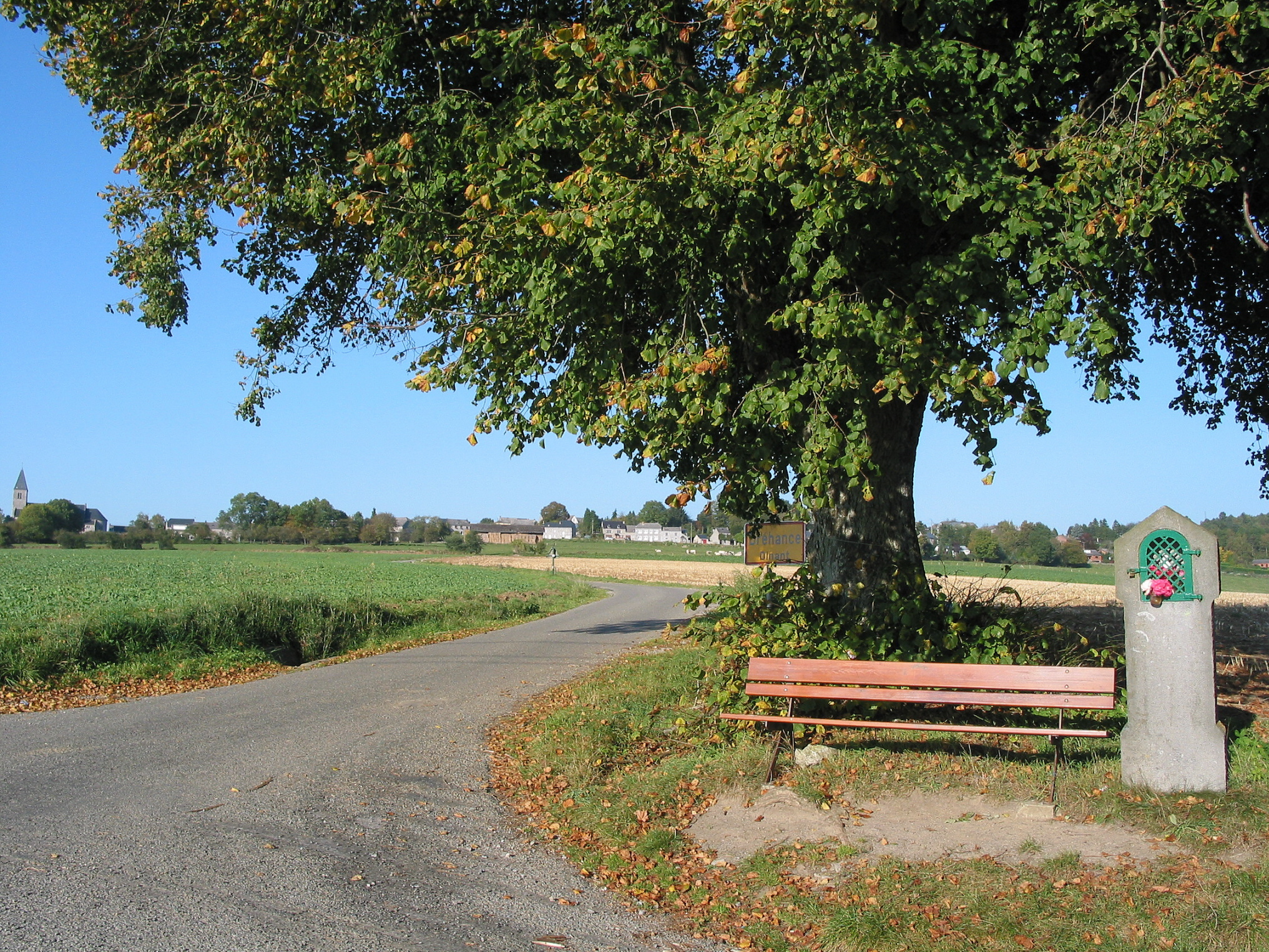 Dréhance, le tilleul commun constellé de clous (arbre fétiche) et la potale dédiée à Notre-Dame.